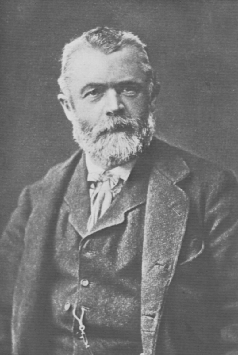 Johann Baptist Obernetter, Selbstporträt